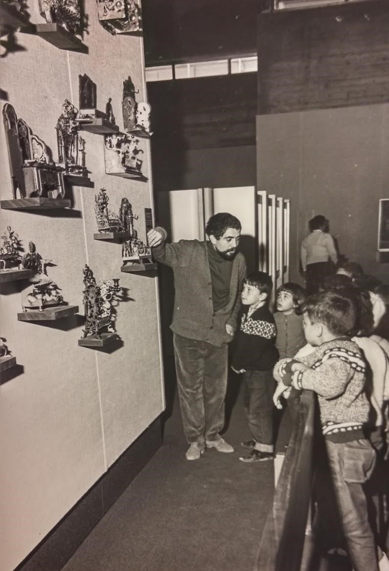 איזיקה גאון הצעיר מדריך קבוצת ילדים בתערוכה באגף הנוער, מוזיאון ישראל